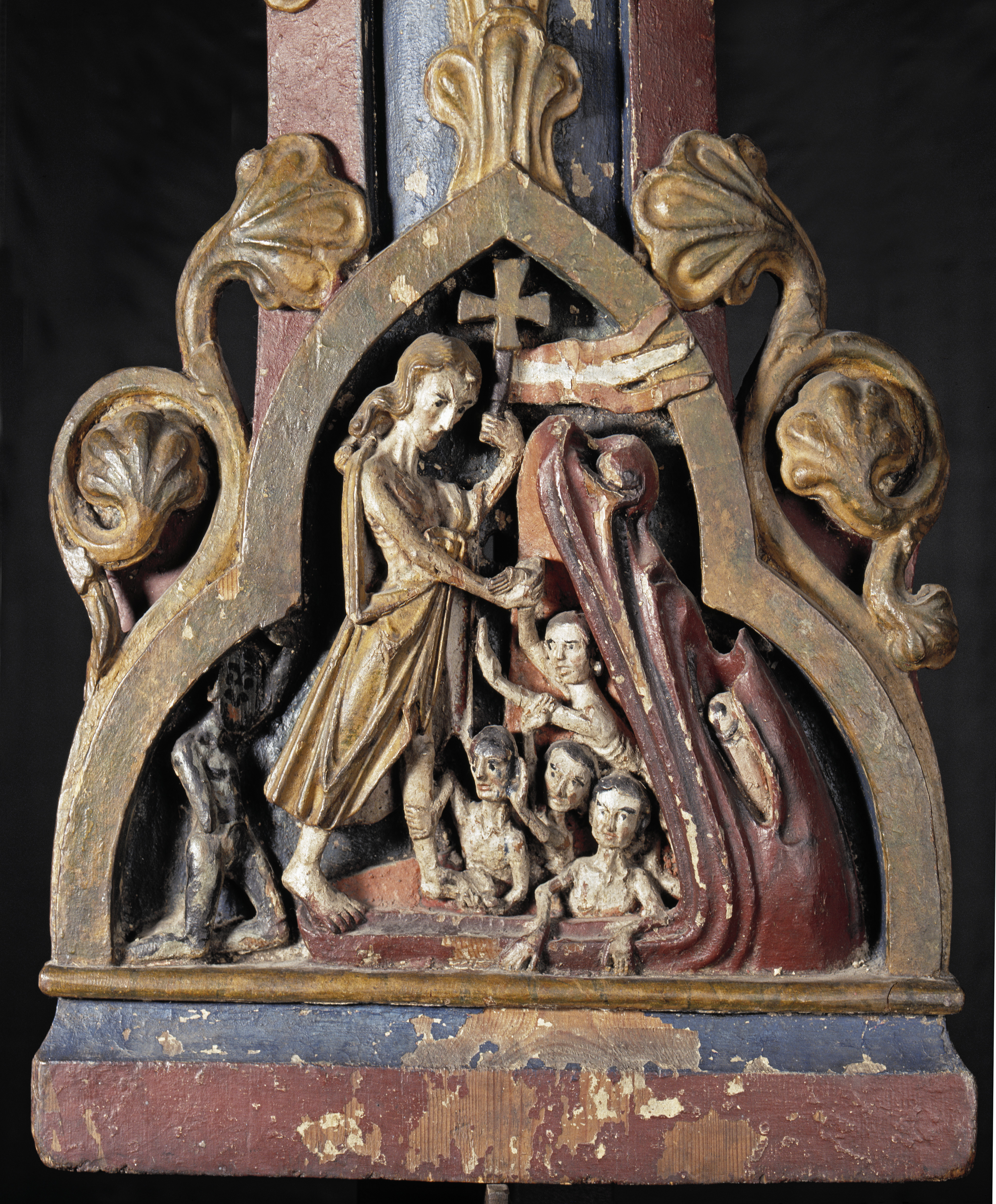 Foto av «Borrekorset» fra kopiert fra Universitetesmuseenes fotoportal på unimus.no der bildet har følgende beskrivelse: Emneord: The Medieval Sculpture Collection Motiv: Borre, Cross. Detalj av kors 'Kristus i dødsriket'. Kors, kristusfiguren mangler. Korset er dekket av vinranker. Korsarmene er dekorert med treflikede medaljonger. De tre øverste inneholder utskjærte symbolder for evangelistene, det nederste viser Kristus i limbus. Korset har ingen naglehull etter en festet kristusfigur. Gjenstand: krusifiks Tid/Periode: Middelalder Sted: Norge, Vestfold, HORTEN, BORRE PRESTEGÅRD, 15 Fotograf: Johnsen, Eirik Irgens Bestillingsnr: Cf24959_A_C6130 Museumsnummer: C6130 Lisens: CC BY-SA 4.0 Lokalitet ("lokid" i Askeladden): 75510